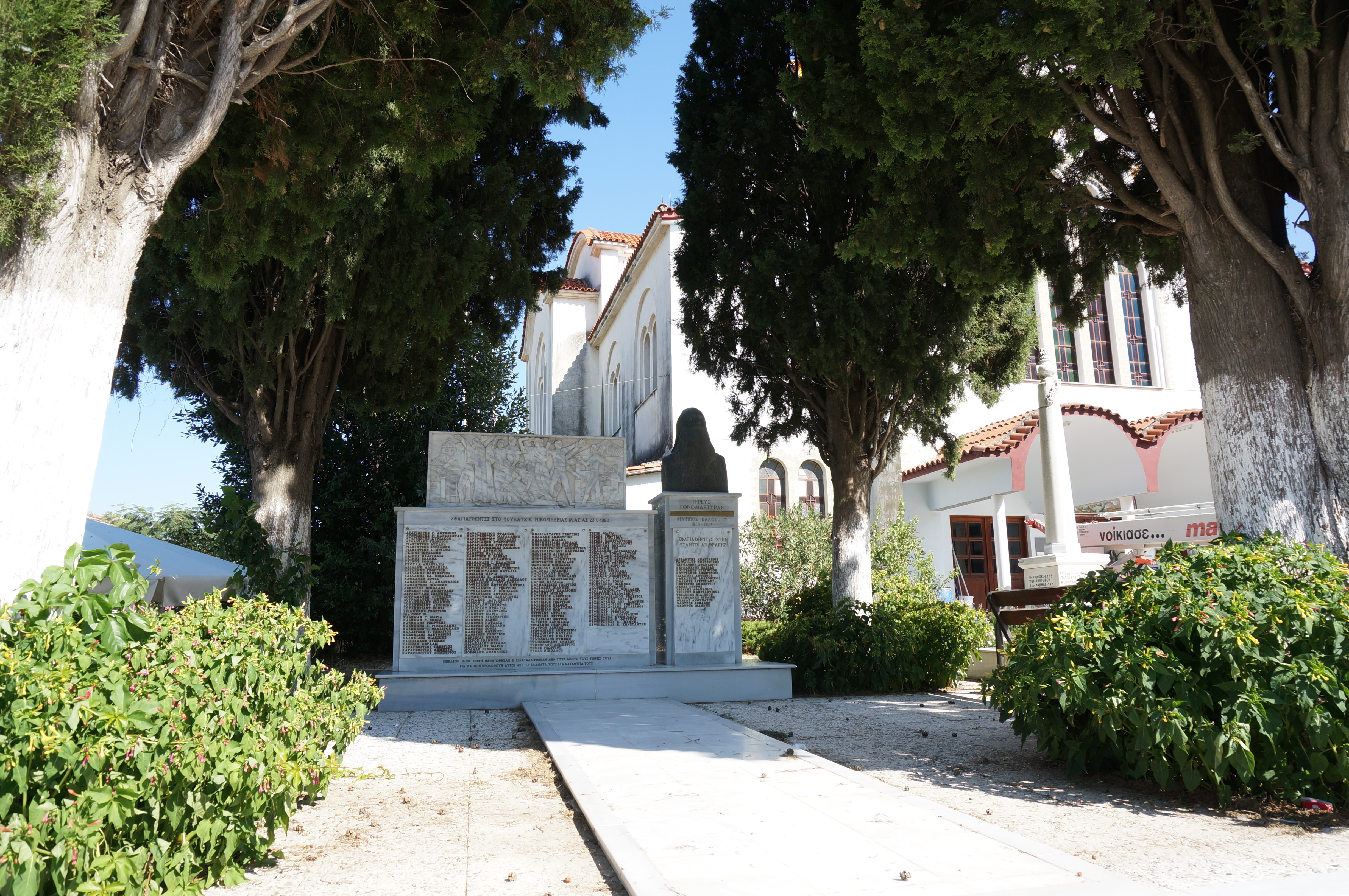 Sur le territoire d'Europos.